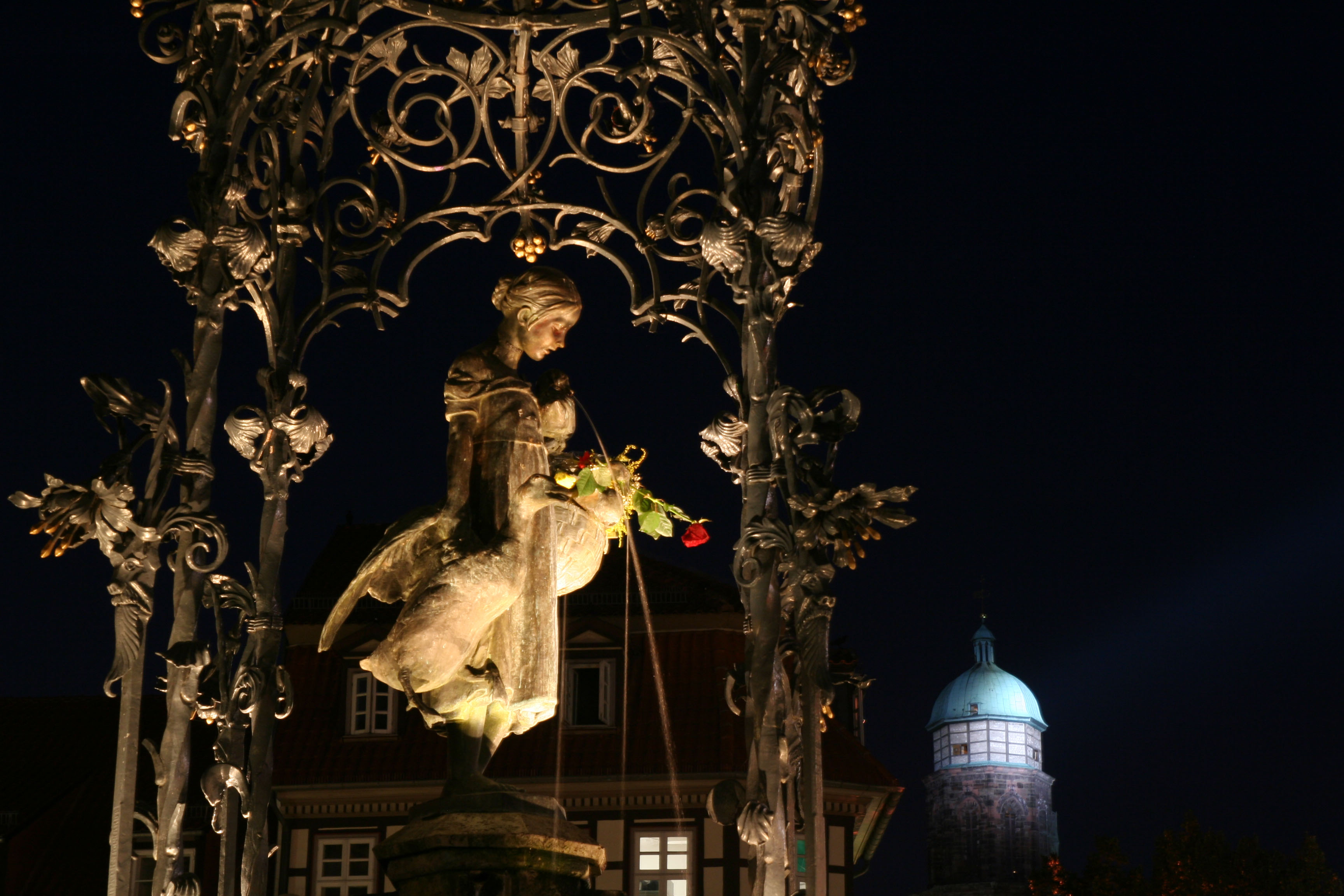 Gänseliesl bei Nacht mit Rose